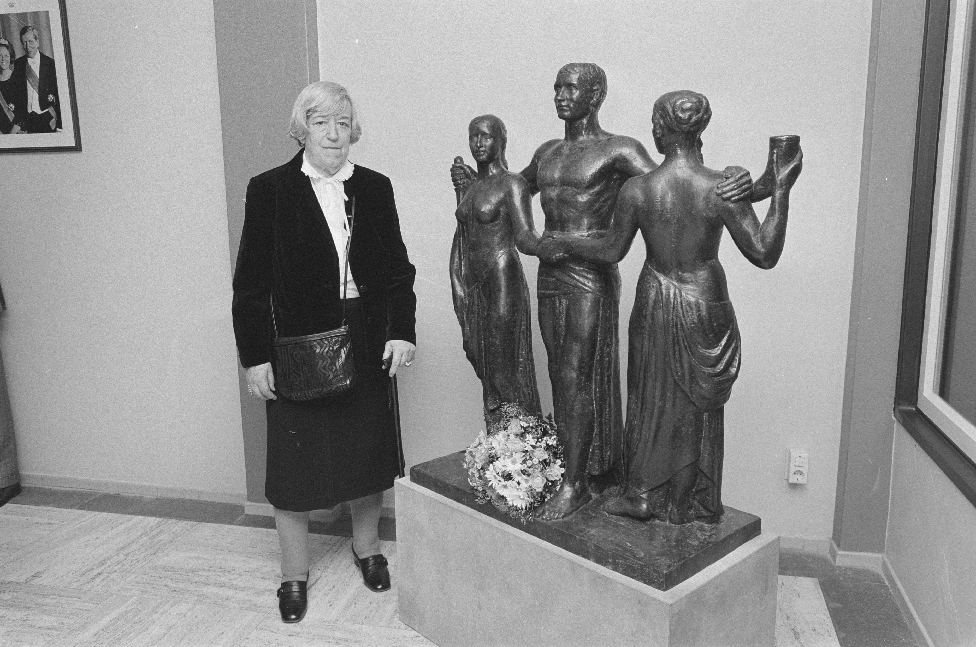 Collectie / Archief : Fotocollectie Anefo Reportage / Serie : [ onbekend ] Beschrijving : Kunstwerk van de hand van verzetsman Gerrit Jan van der Veen onthuld in gebouw Raad van Arbeid in Amsterdam; weduwe van Van der Veen bij het kunstwerk Annotatie : Het beeld "De Eendracht Van Het Land", ontworpen door Gerrit van der Veen, gekapt door de Amsterdamse beeldhouwer G.W. Harmsen. Het beeld staat sinds 1940 ook boven de Leidseveertunnel in Utrecht. Het was zijn laatste beeldhouwwerk. Datum : 27 maart 1987 Locatie : Amsterdam, Noord-Holland Trefwoorden : kunstwerken, onthullingen Persoonsnaam : Veen-van der Chijs, Louise van der Instellingsnaam : Raad van Arbeid Fotograaf : Gerrits, Roland / Anefo, [onbekend] Auteursrechthebbende : Nationaal Archief Materiaalsoort : Negatief (zwart/wit) Nummer archiefinventaris : bekijk toegang 2.24.01.05 Bestanddeelnummer : 933-9364